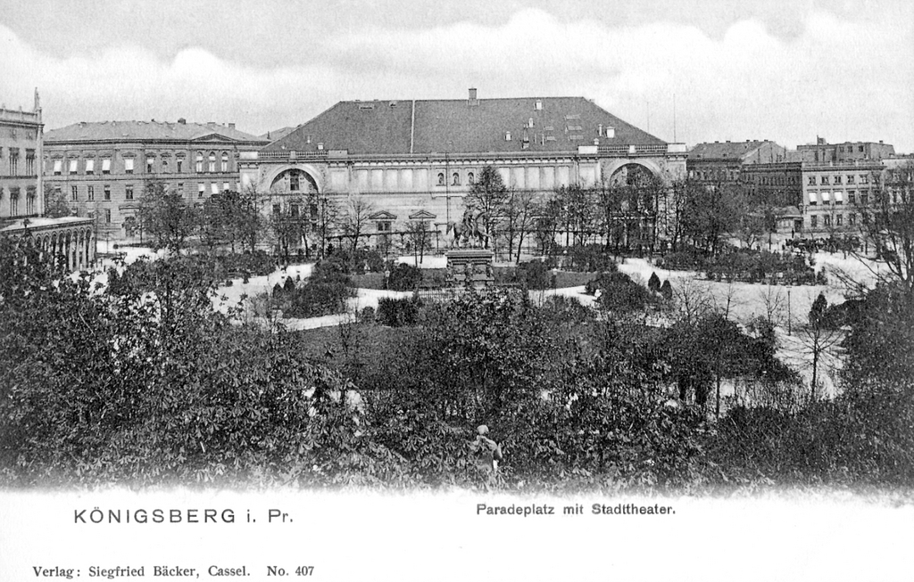 Königsberg